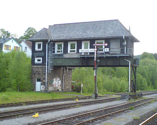 Reiterstellwerk Brügge (Westf)